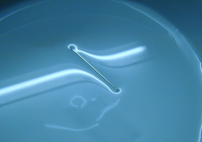 Aguja de acero "flotando" en agua, gracias al fenómeno de la tensión superficial. Despues de hacer muchos intentos se puede lograr. Con un detergente liquido puedes lograrlo.